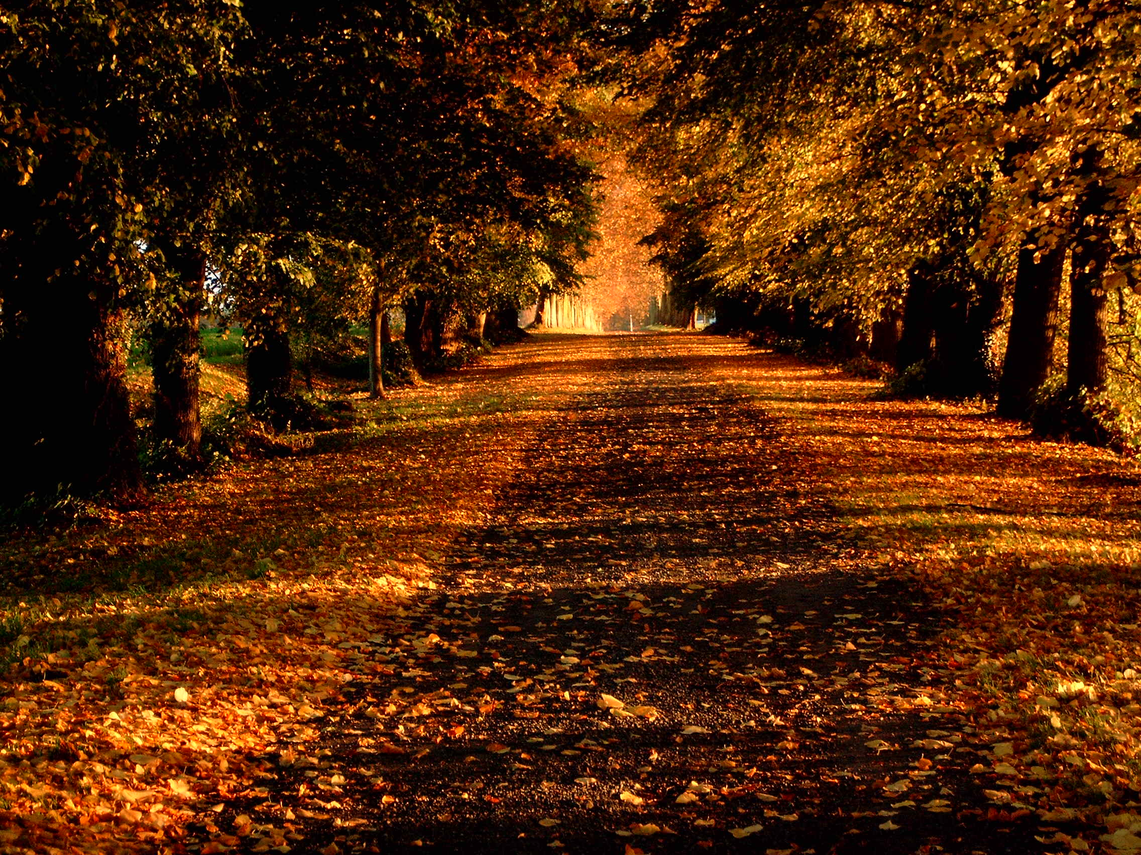 Oprijlaan van het Chateau de Flawinne, eigen opname.